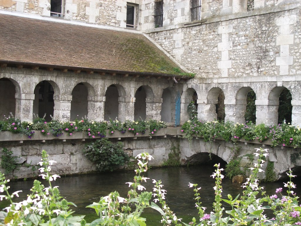 Cloître des Pénitents - Louviers - Eure